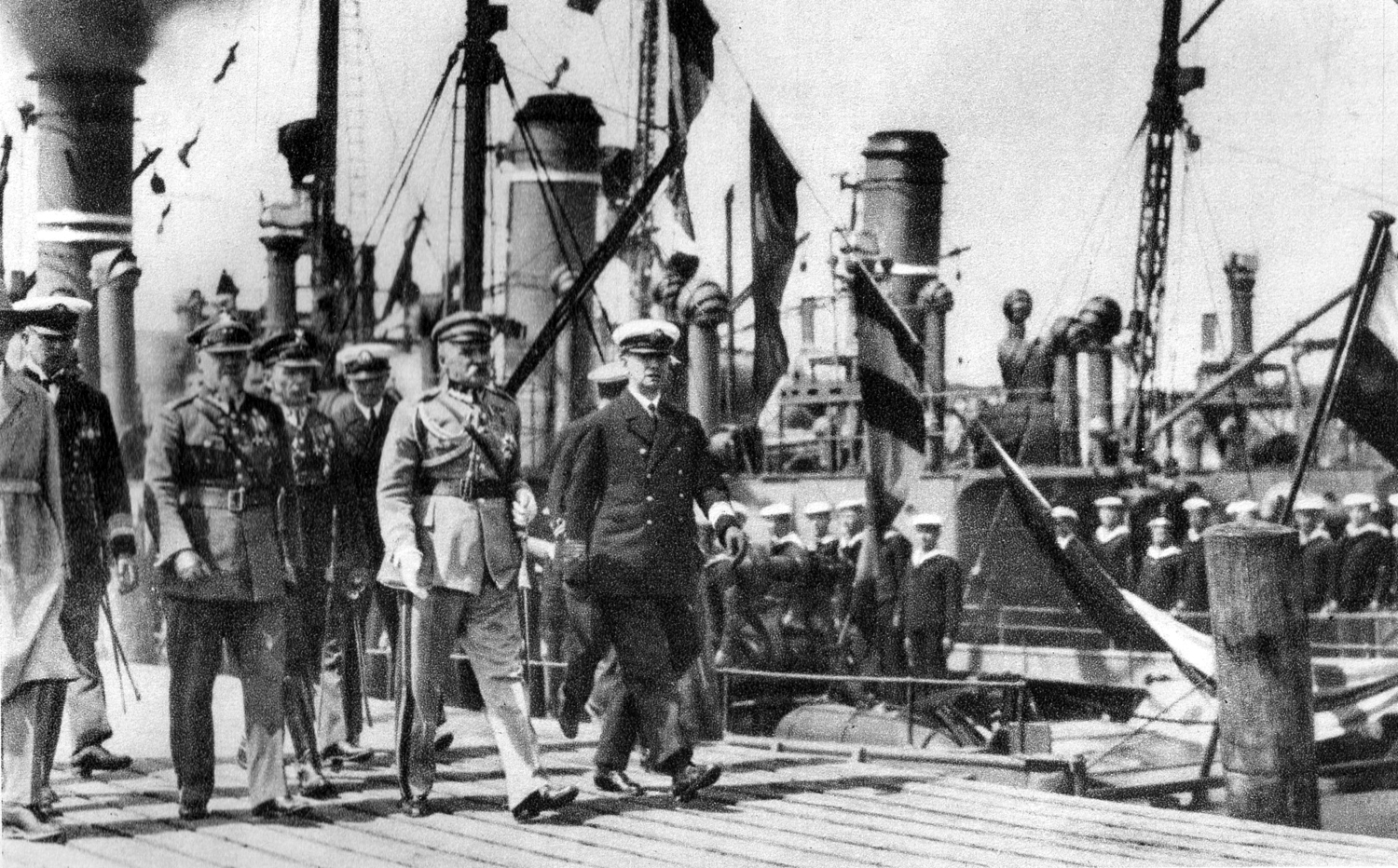 Marszałek Piłsudski, admirał Świrski i minister Prystor w Gdyni